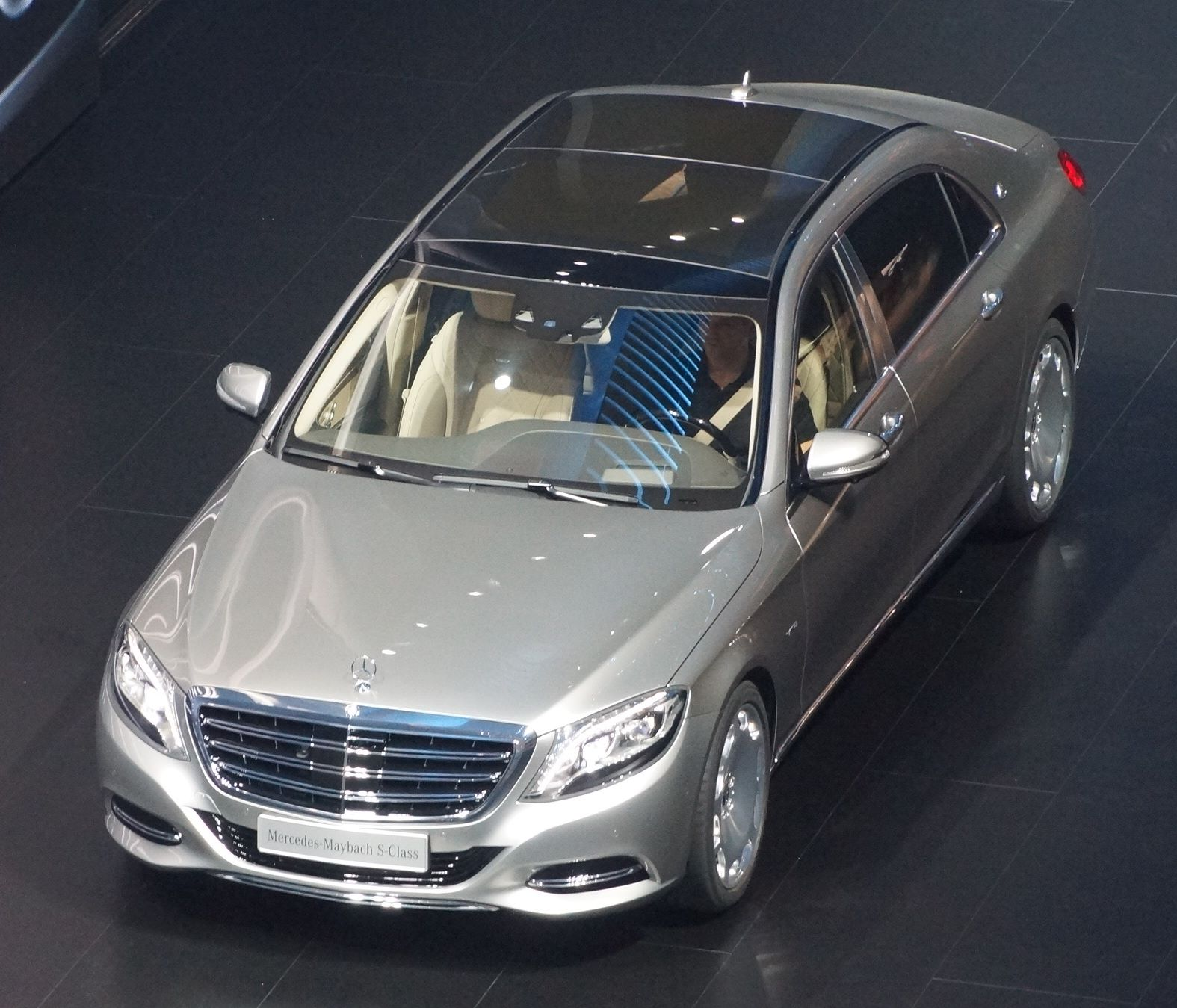 Mercedes-Maybach S Class at IAA 2015